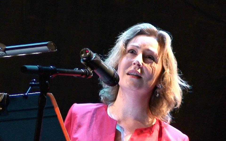 Karine Deshayes - 23 octobre 2011